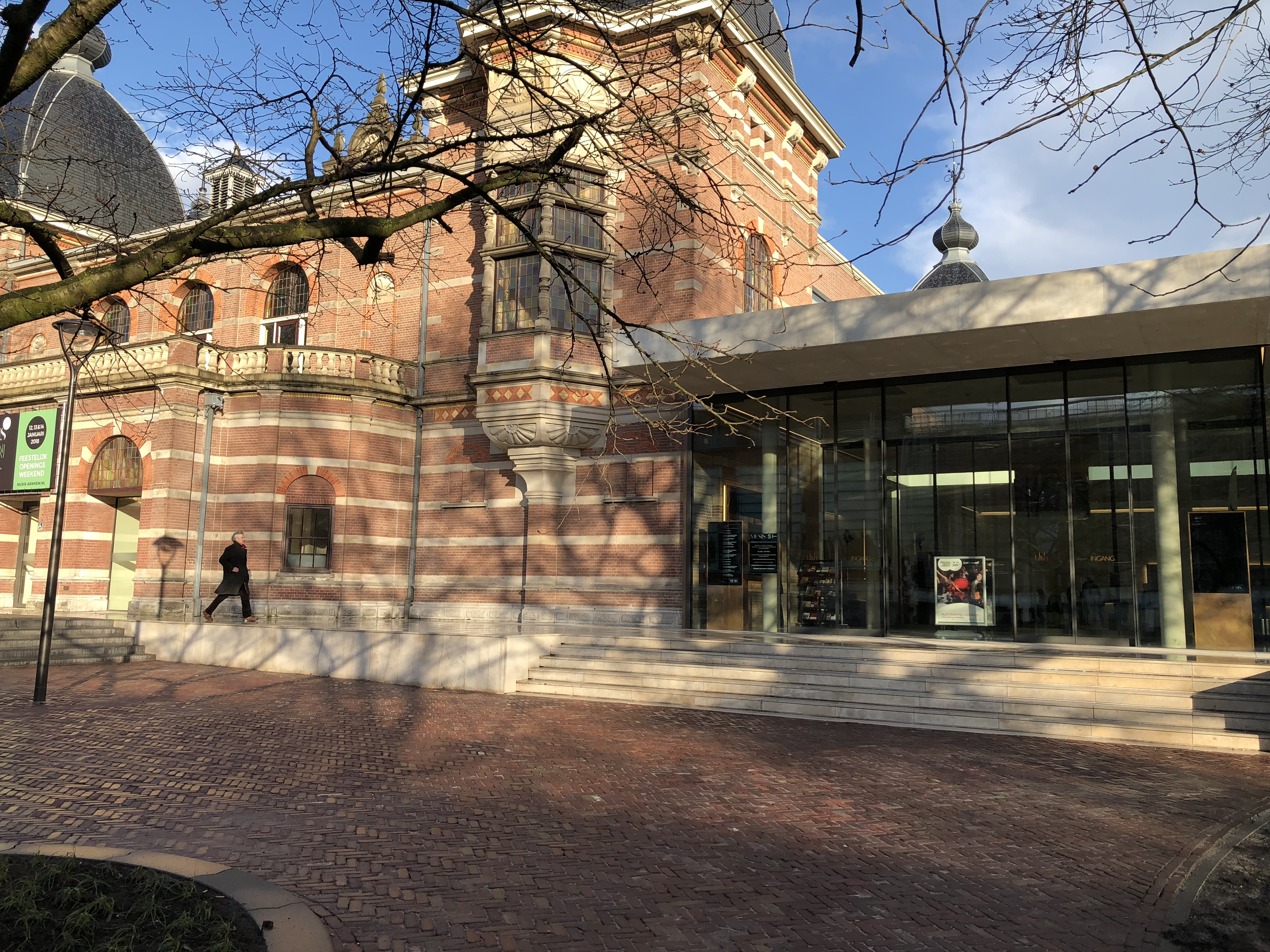 Het oude en nieuwe Musis Sacrum